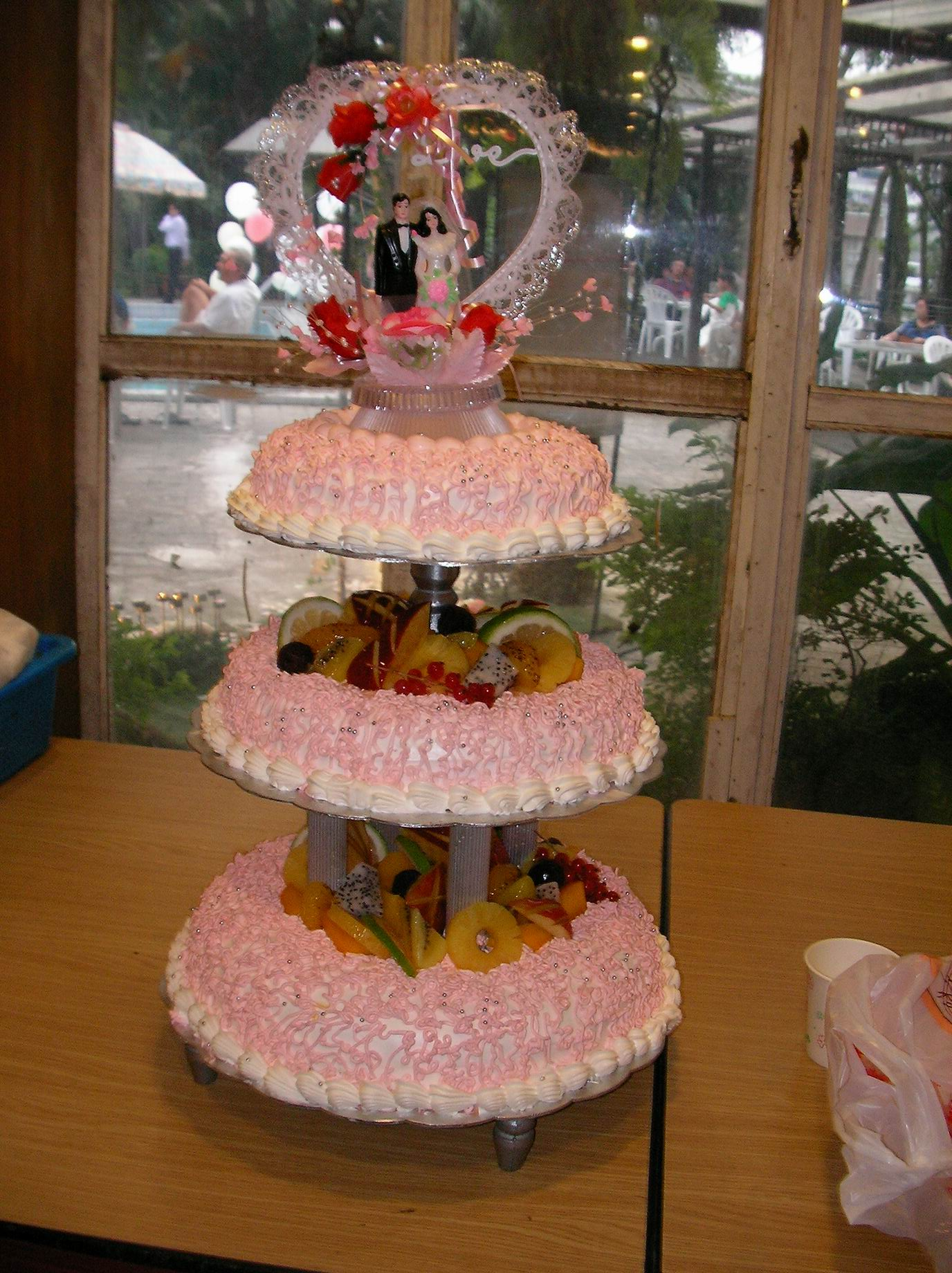 Eztei-tarta bat.